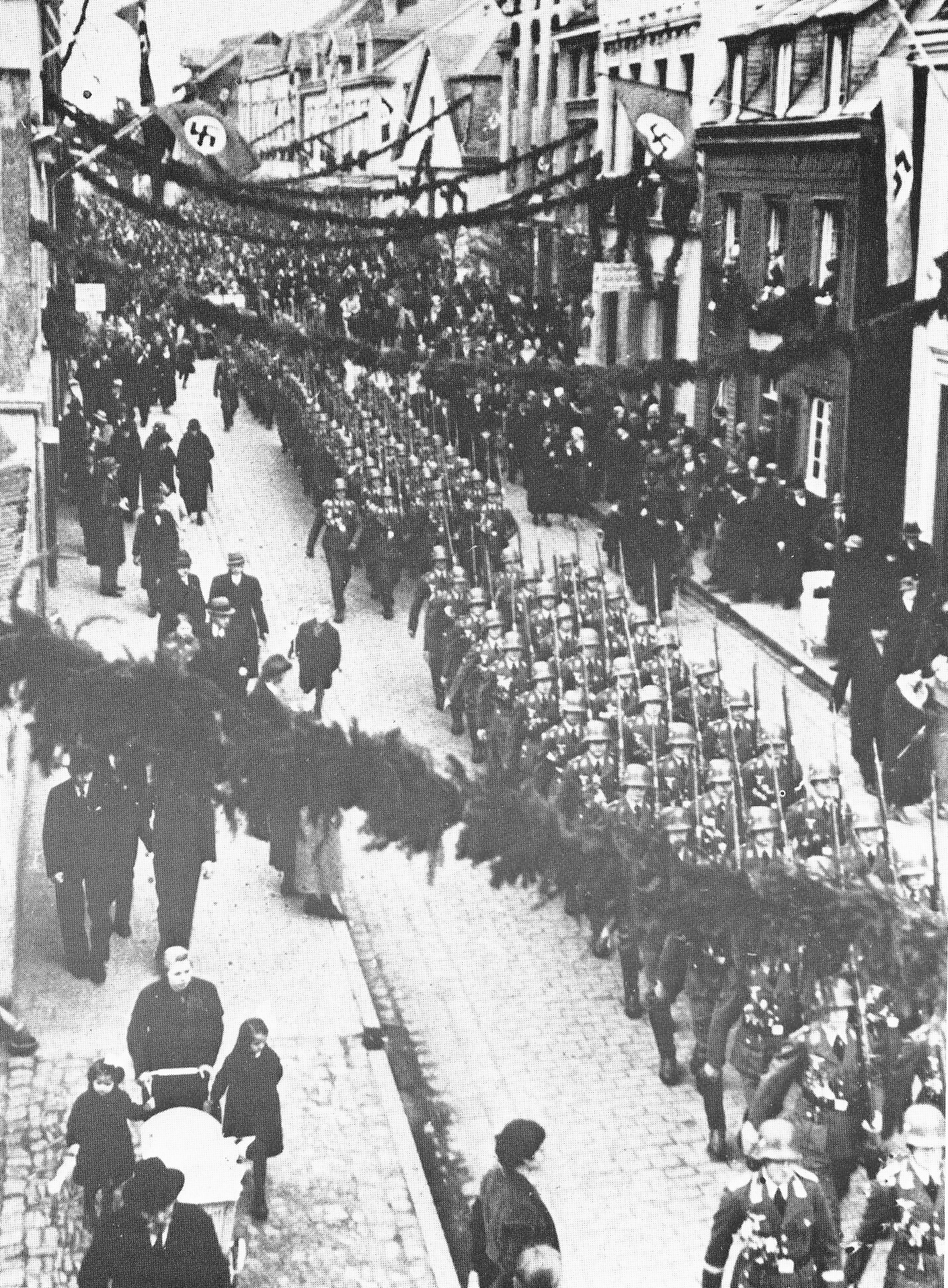 Eröfffnungsparade des Fliegerhorstes in der Werler Innenstadt